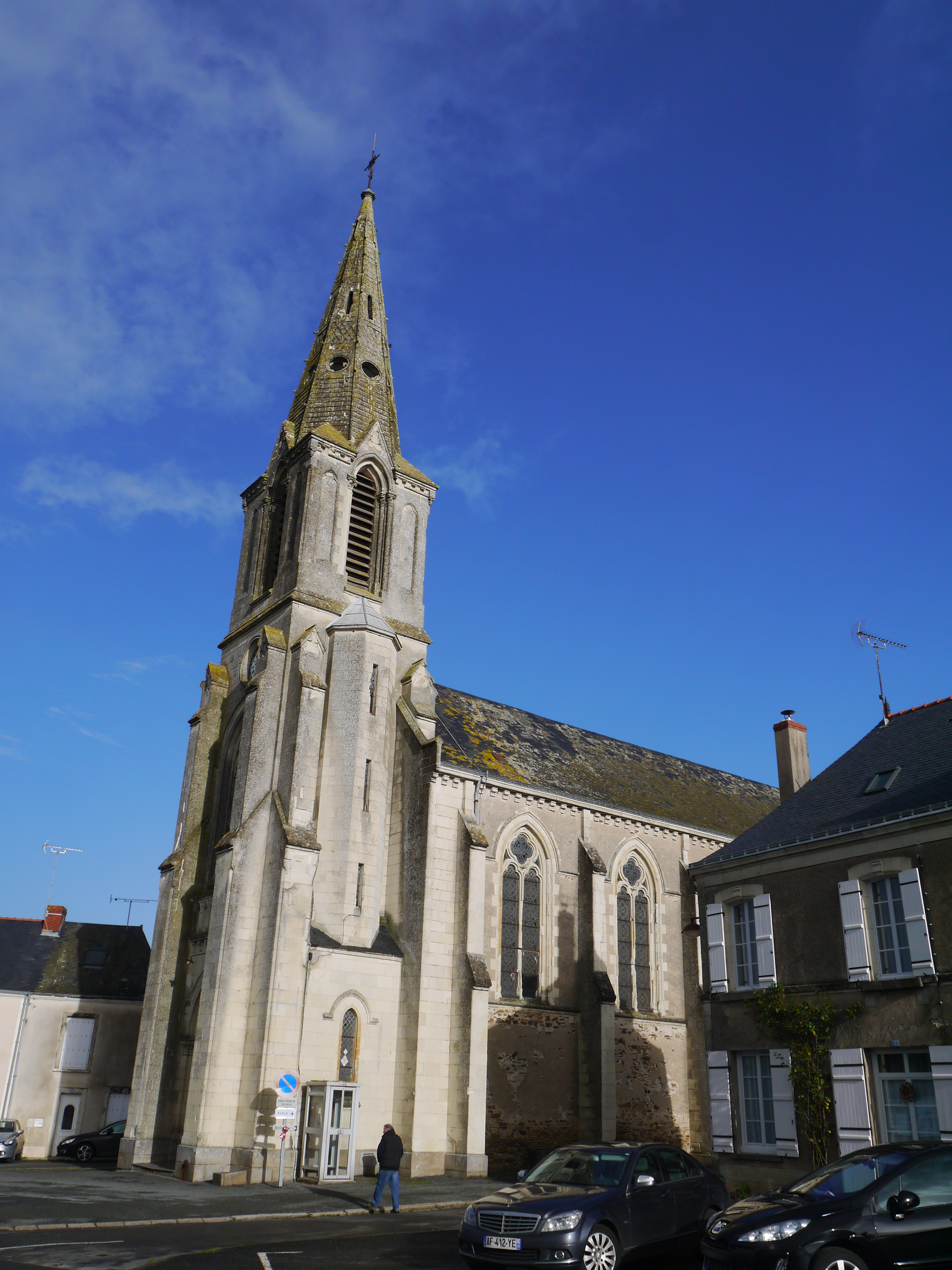 L'église Saint-Serge-et-Saint-Bach.